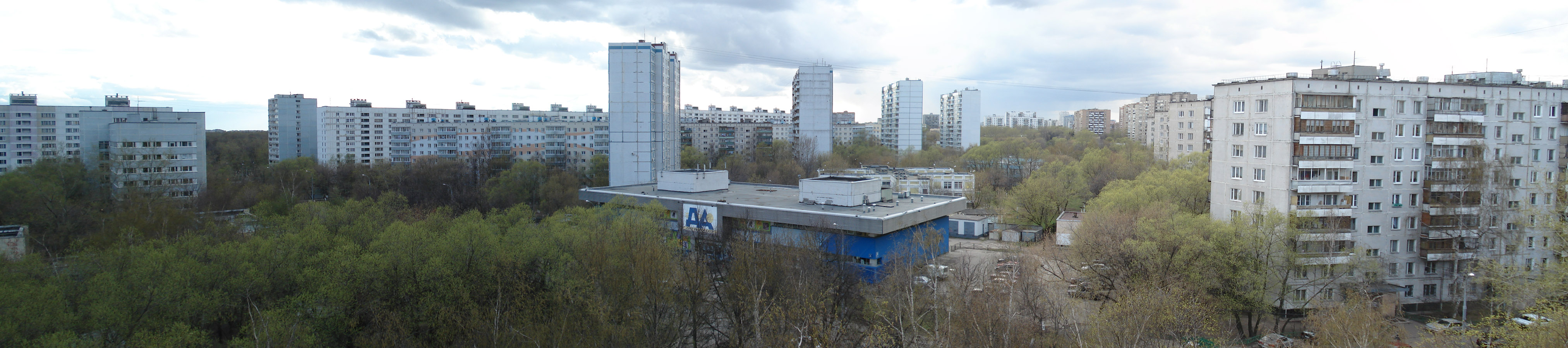 Панорамный вид на Сормовскую улицу в Москве.